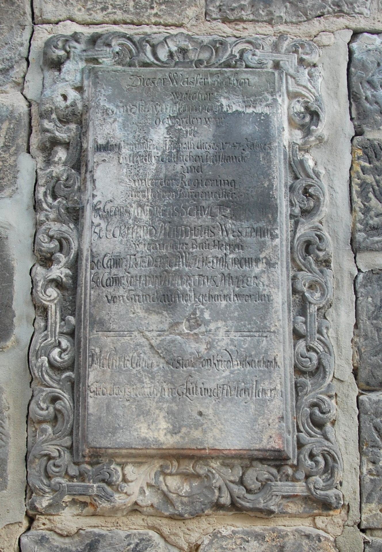 Tafel am Grundstück Hohe Straße 19 in Quedlinburg